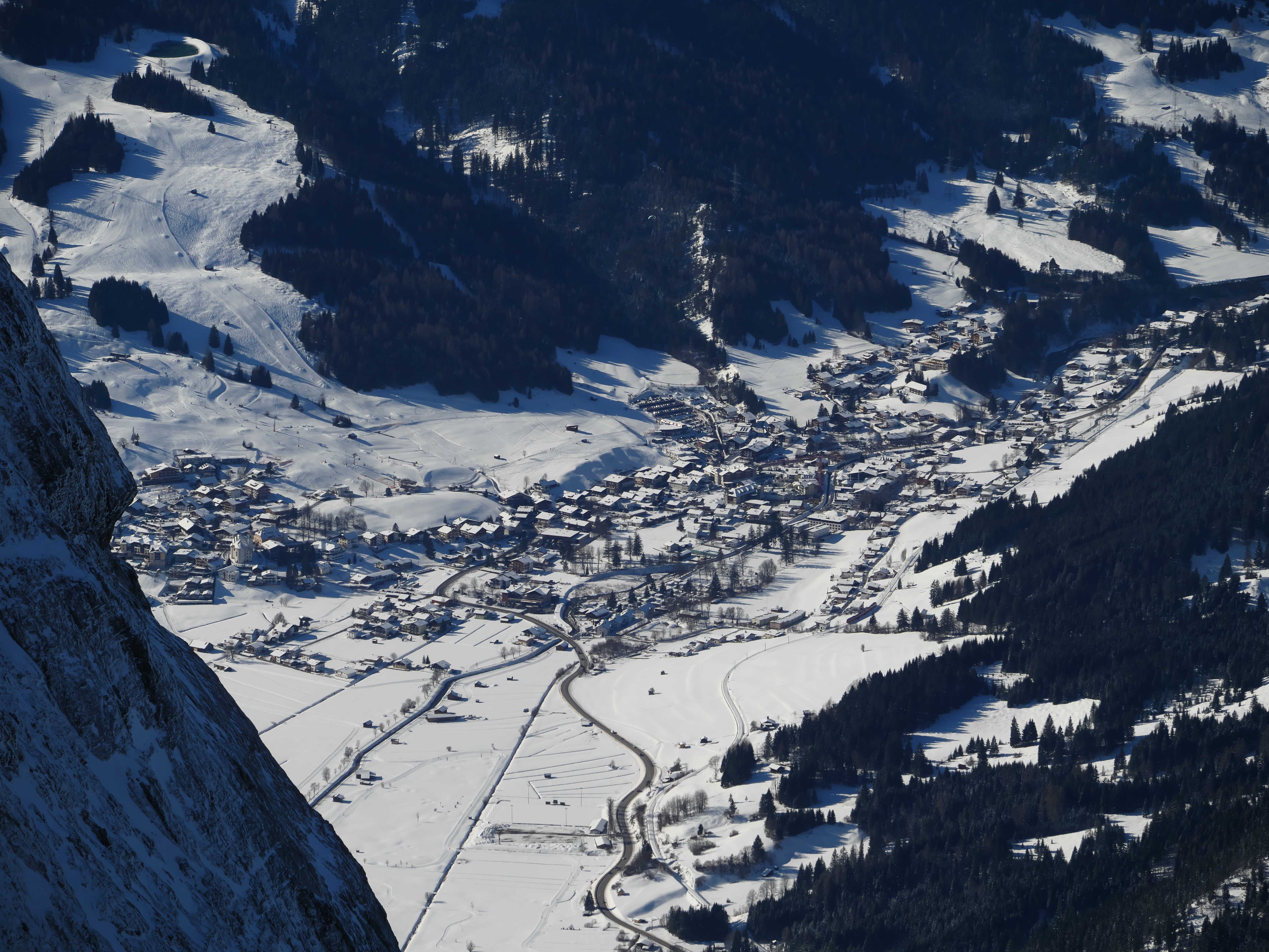 Lermoos im Winter von der Zugsptize aus gesehen.